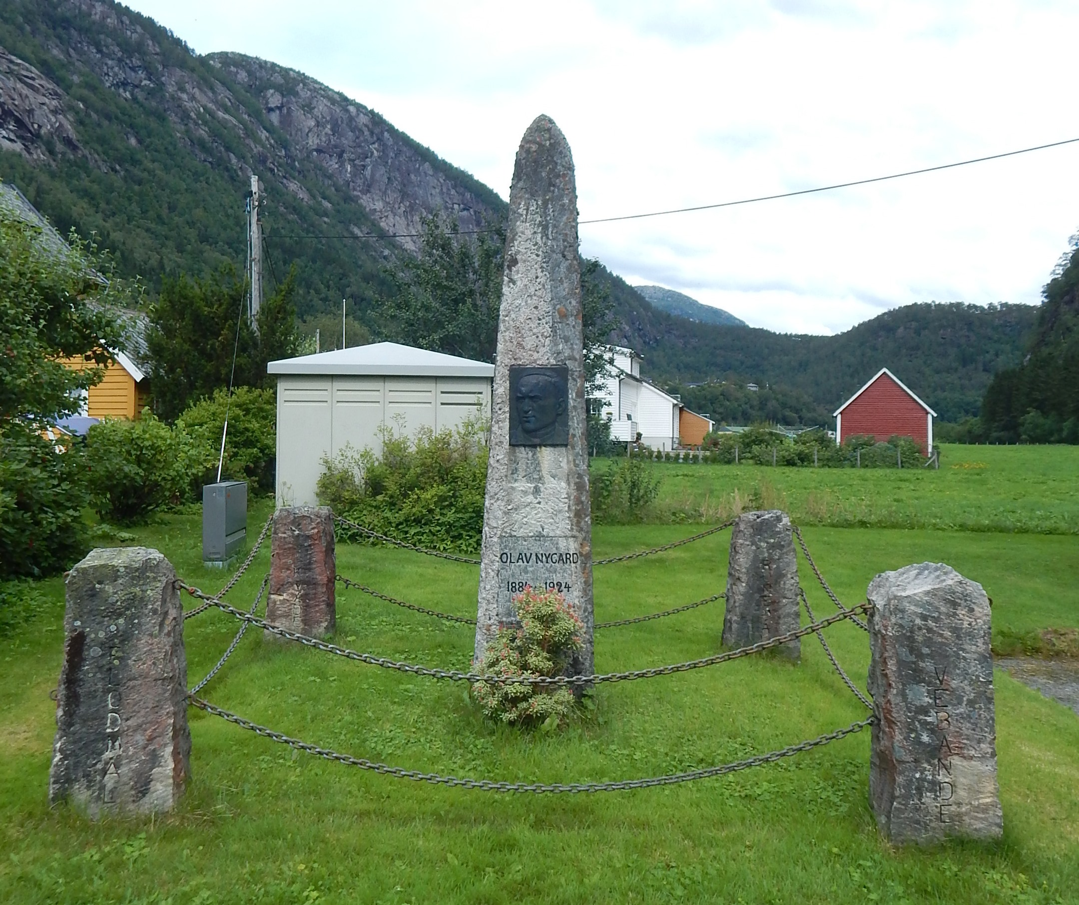 Minnesmerke over Olav Nygard i Mo i Modalen